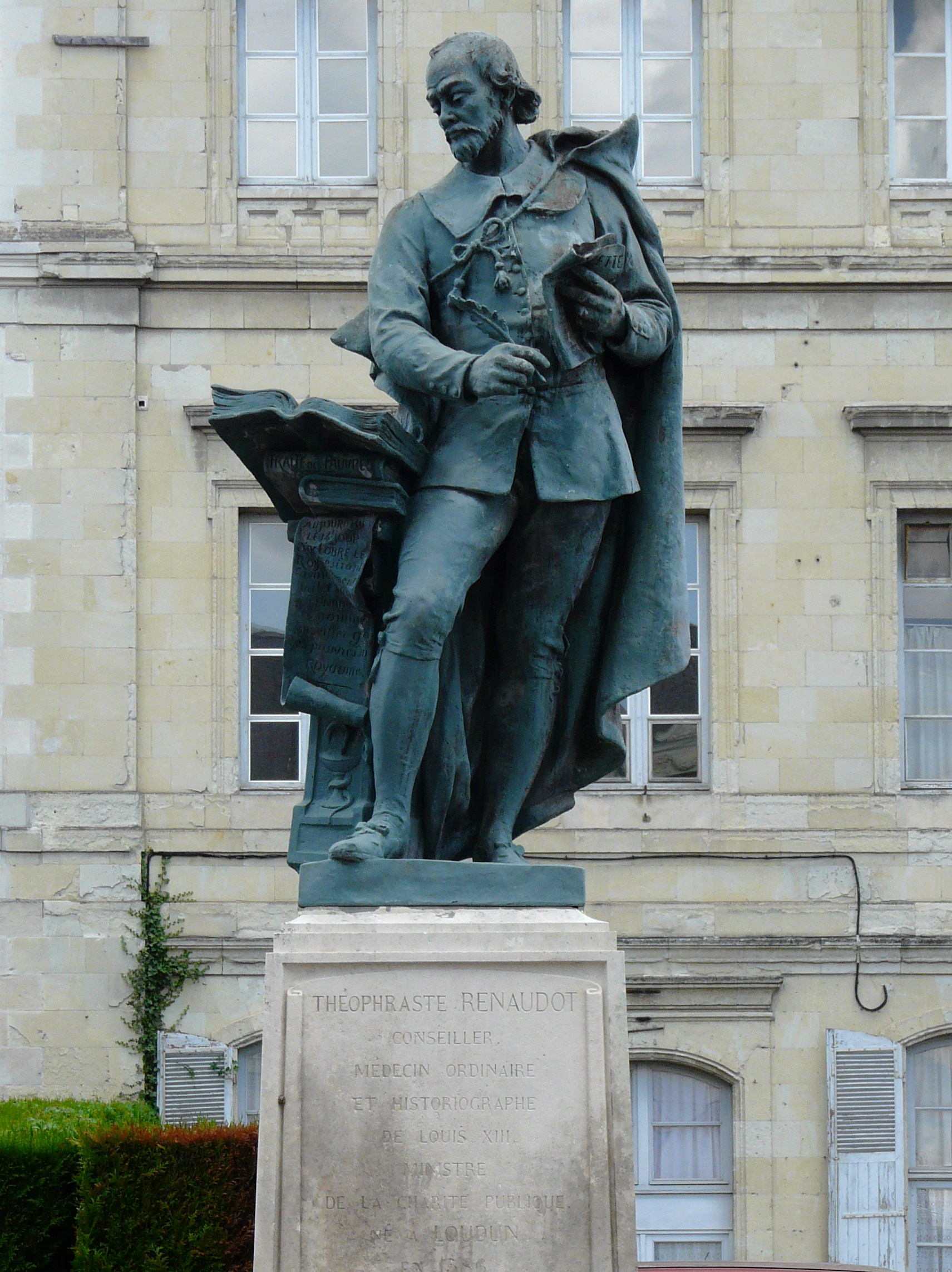 Statue représentant Théophraste Renaudot à Loudun, sa ville natale, Vienne, France